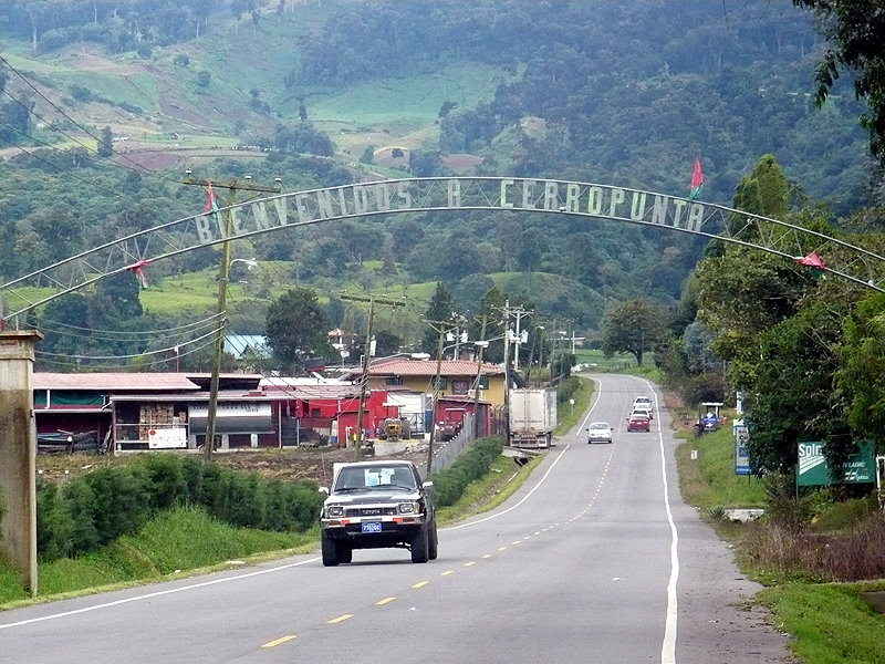 Entrada de Cerro Punta, Distrito de Bugaba, Provincia de Chiriquí, Rep. de Panamá